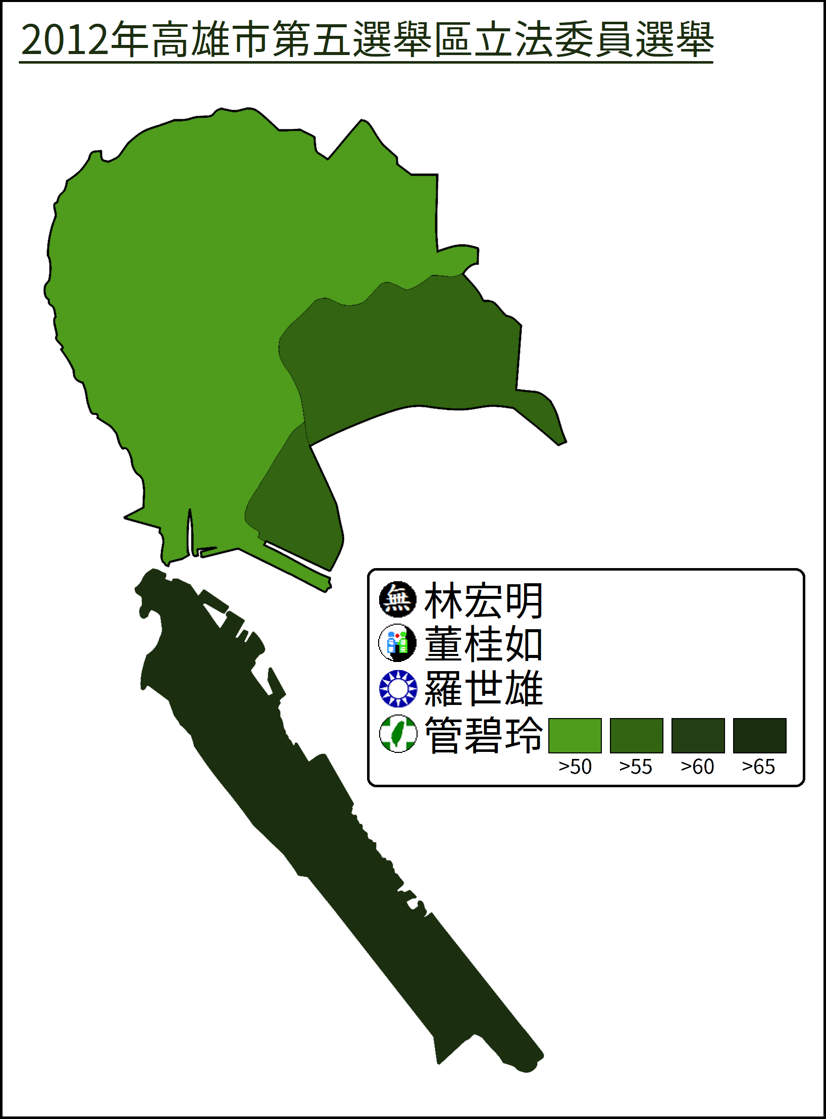 2012年立法委員選舉高雄市第五選舉區